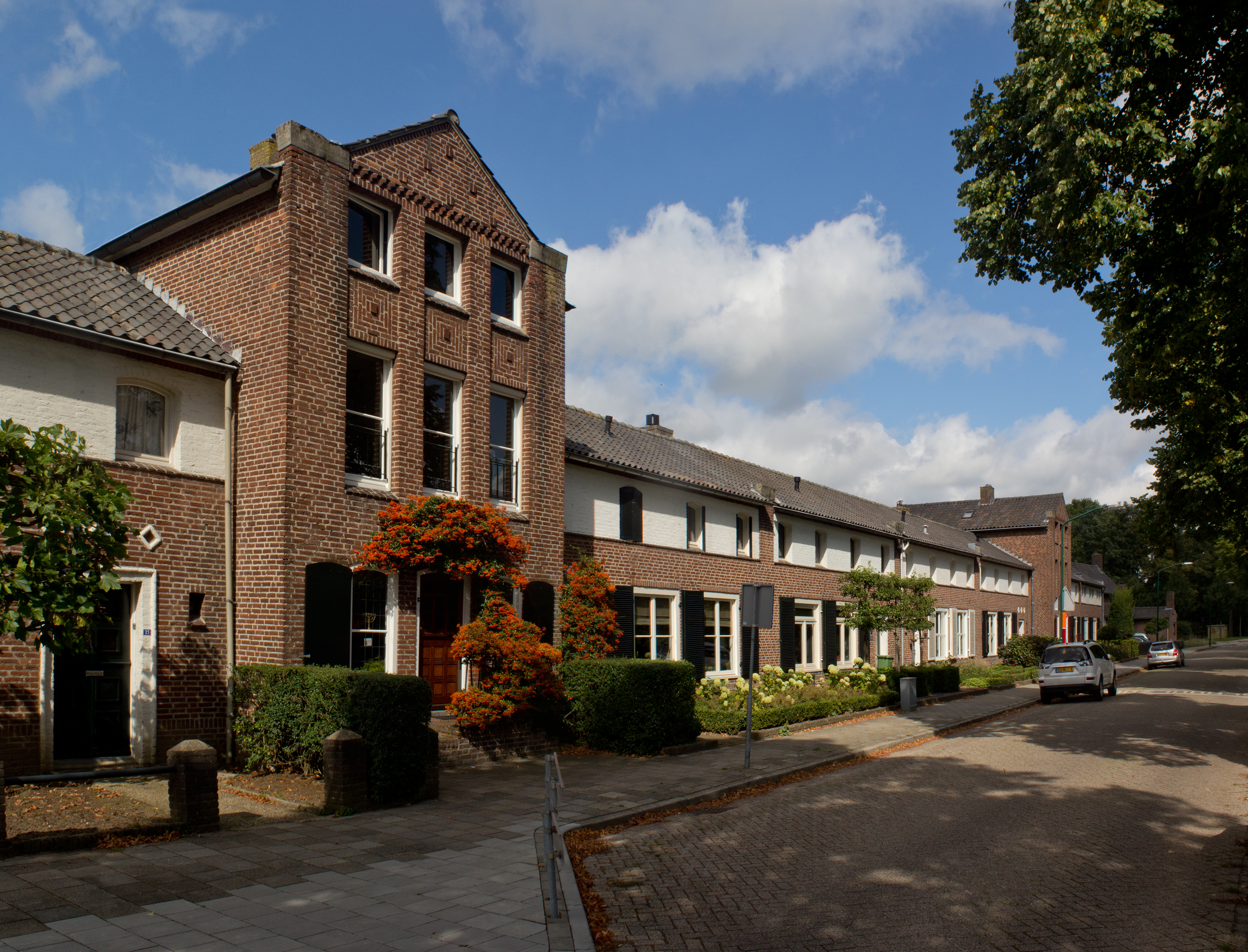 Het Blauwe Dorp te Grave. Woningen aan de Burgemeester Ficqlaan, ontworpen door Jan de Jong in 1950/51